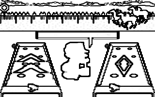 Schématisation de l'affichage du jeu vidéo "Kentucky Racing"